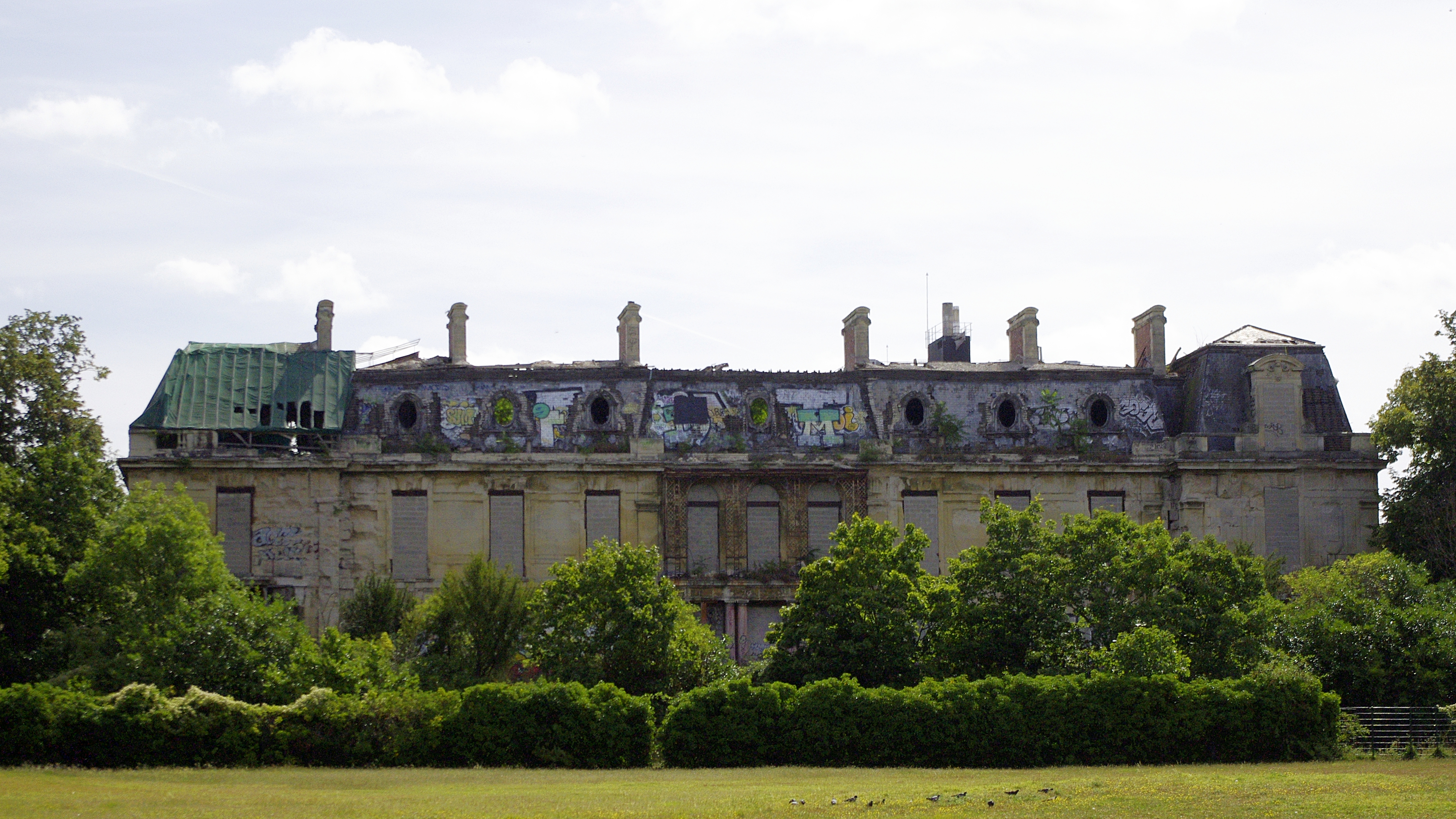 Parc Edmond de Rothschild à Boulogne-Billancourt (Hauts-de-Seine, France) - bâtiment abandonné.